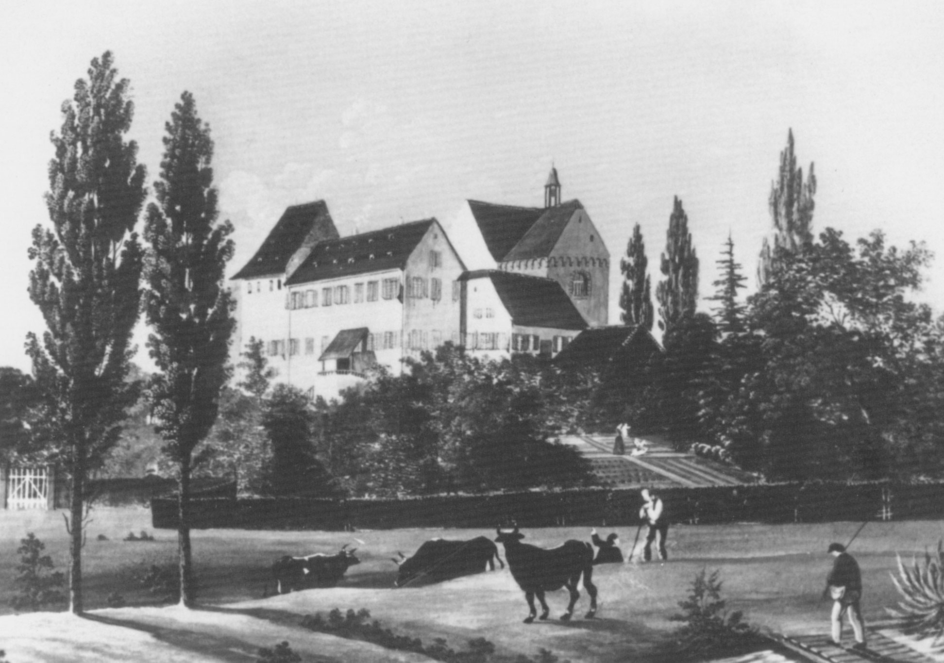 Kloster Lobenfeld, anonyme Gouache um 1800, reprod. in Doris Ebert: Die Gärten im Kloster Lobenfeld – mehr als 800 Jahre Gartennutzung innerhalb des Immunitätsbezirks, Lobbach 2008, S. 20.